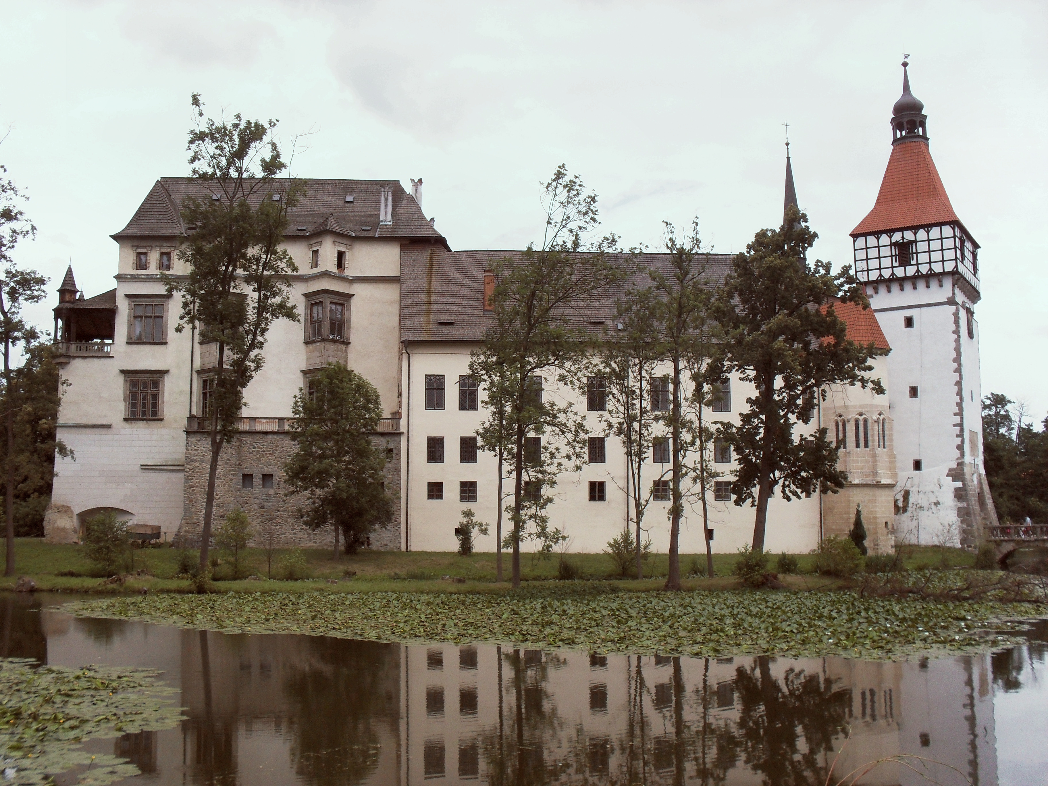 Zámek Blatná, celkový pohled v červenci. Vlastní foto